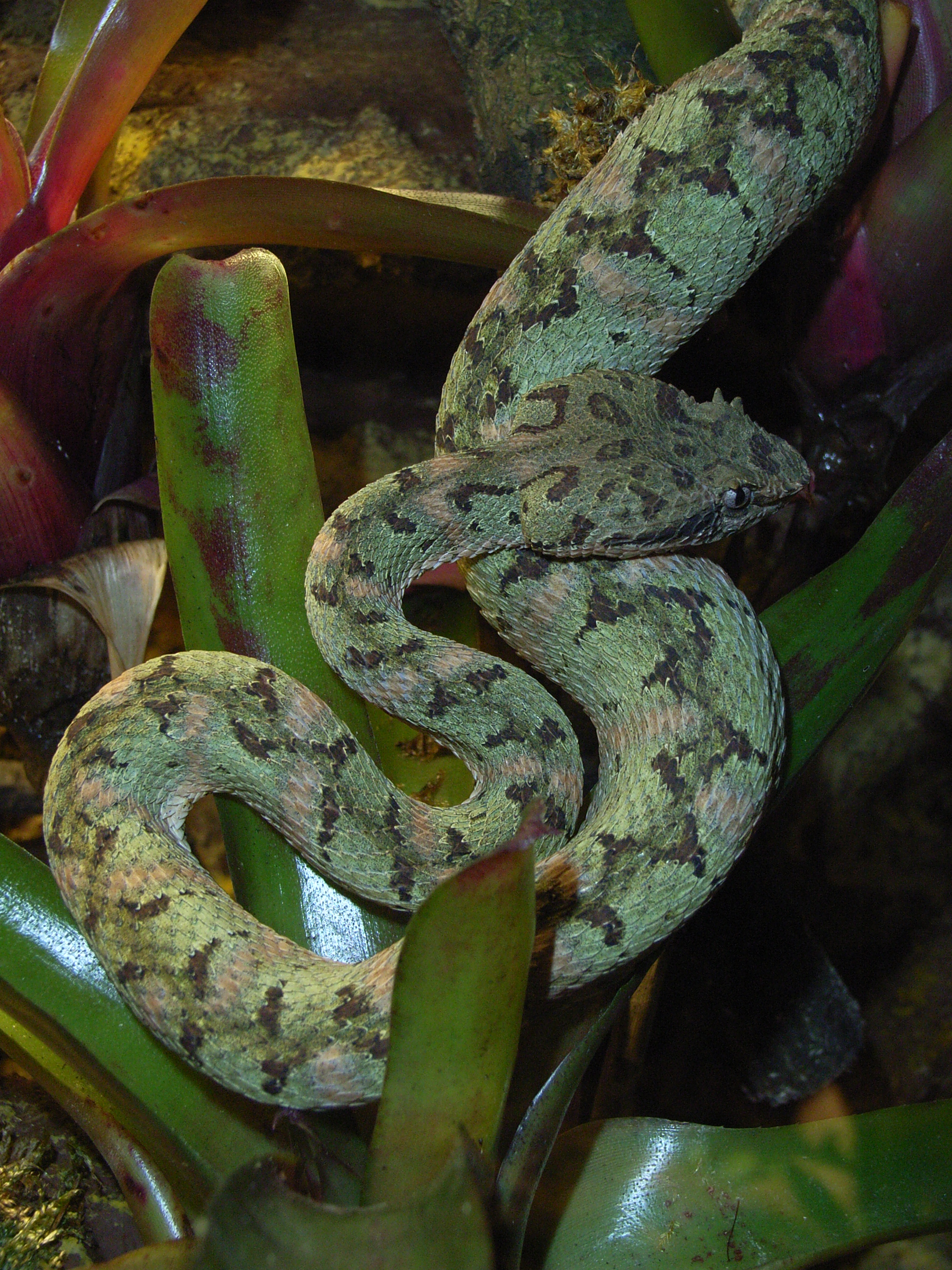 Greifschwanz-Lanzenotter (Bothriechis schlegelii), Weibchen, im Terrarium fotografiert